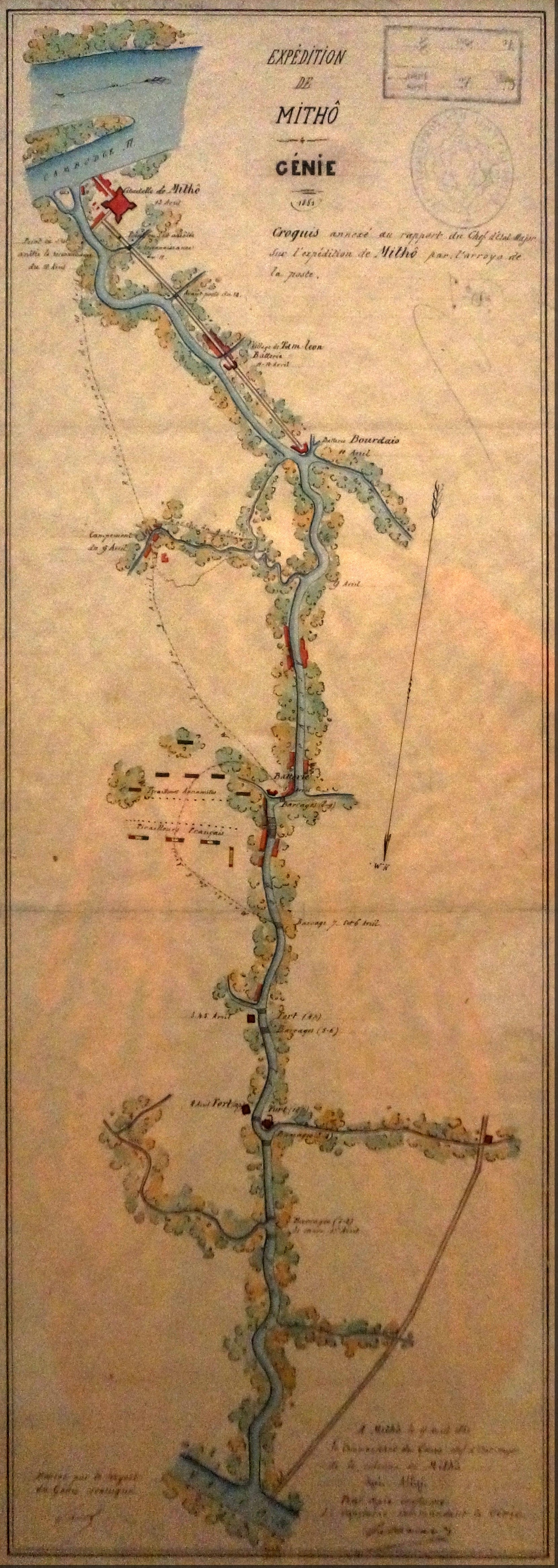 présenté lors de l'exposition Indochine des territoires et des hommes 1856 1956.